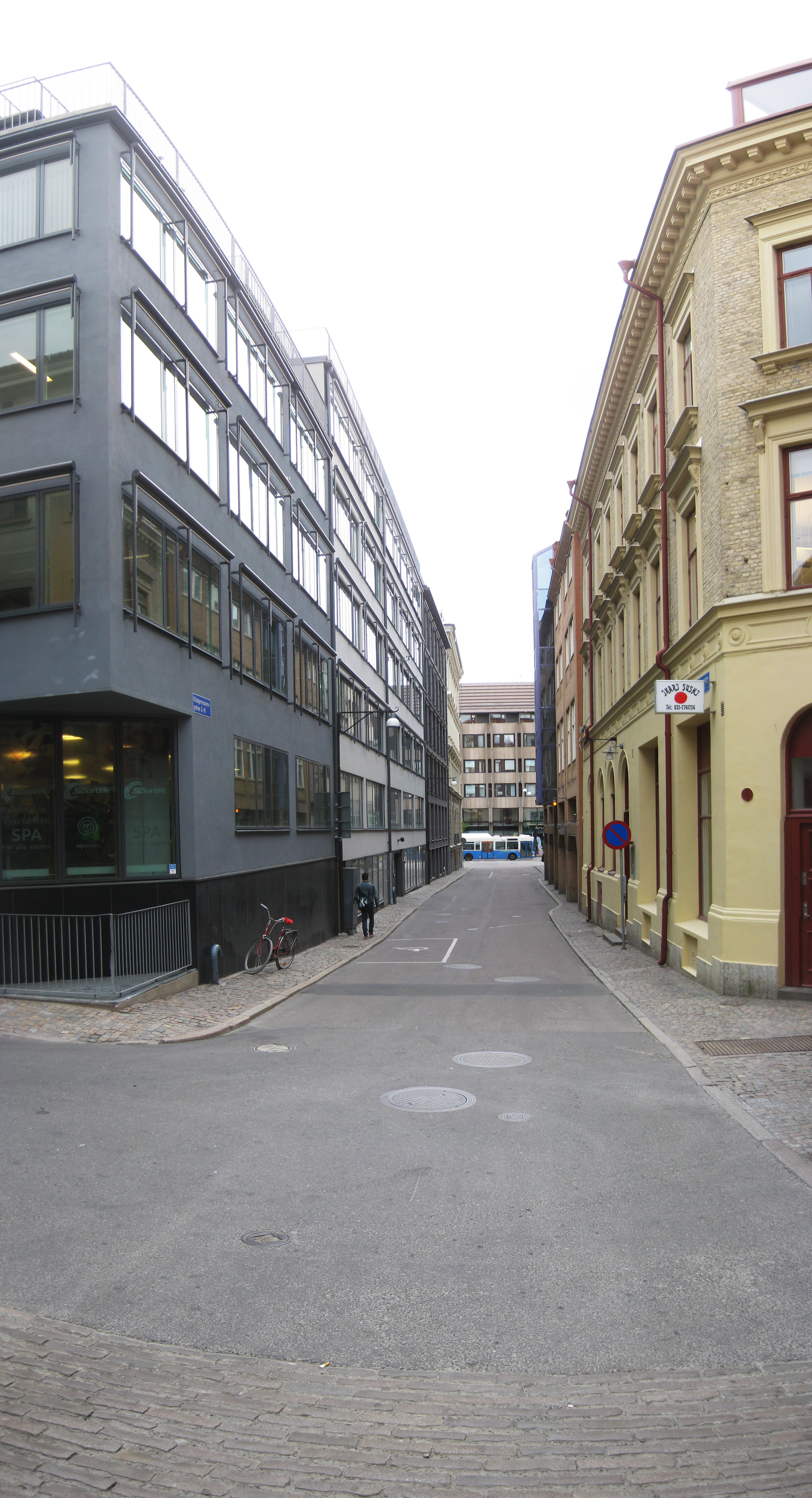 Bilden är tagen precis vid gränsen Kvarnbergsgatan/Klädpressaregatan i Göteborg.